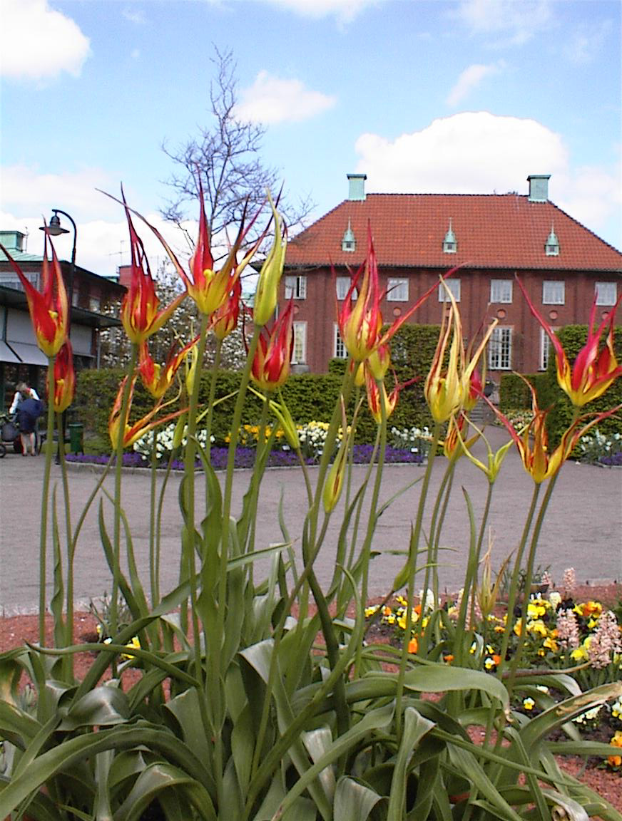 Tulipa acuminata in Botaniska Trädgården i Göteborg